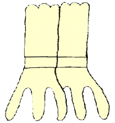 Glifo de Omitlan, Hidalgo